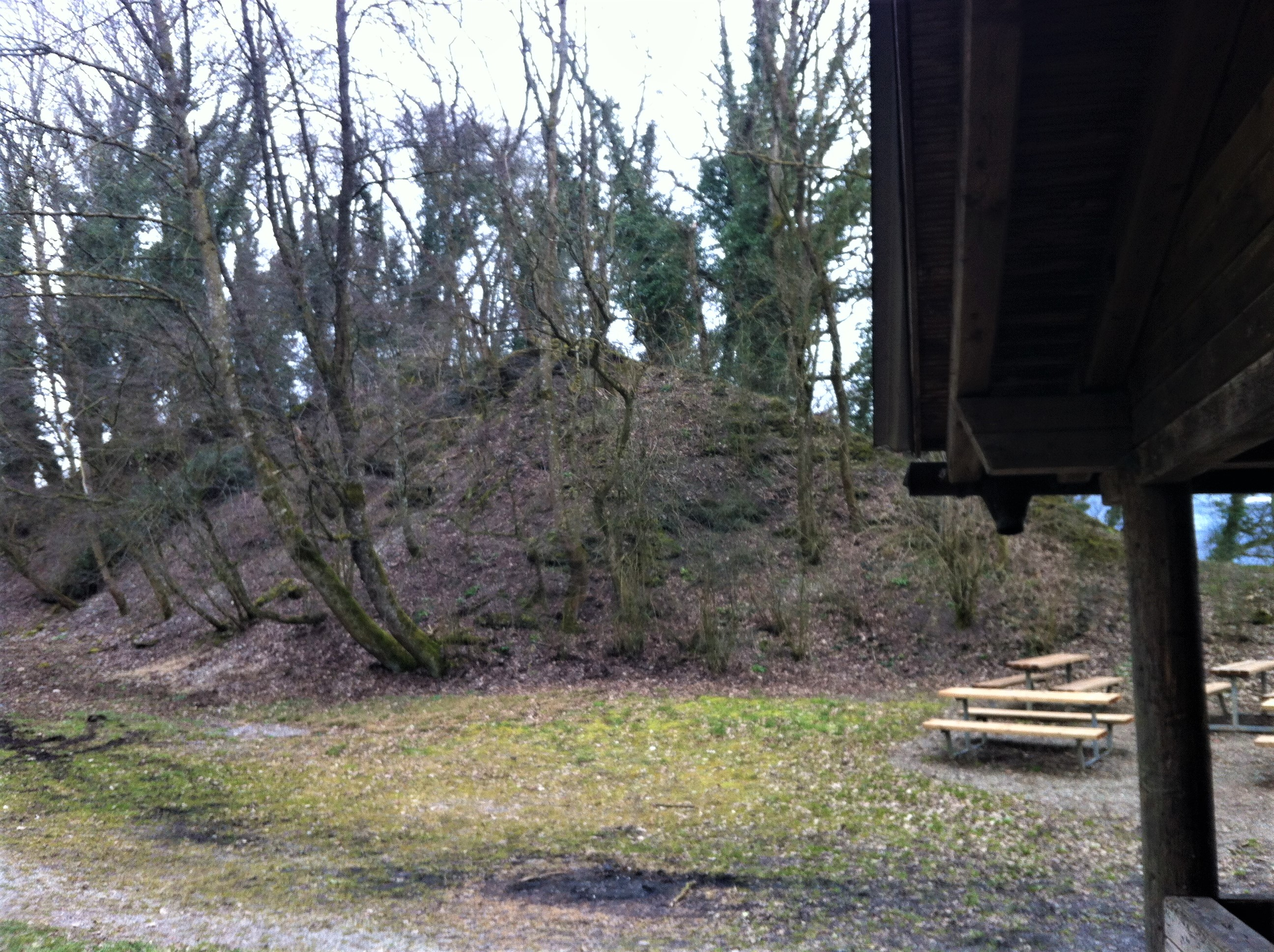 Der Galgenbuck östlich von Oberlauchringen, Gemeinde Lauchringen im Landkreis Waldshut in Baden-Württemberg. Mittelalterliche Hinrichtungsstätte. Mehrere Felserhebungen aus Nagelfluh. Mittlerer Bereich — vermutete Hinrichtungsstelle (heute mit Festhütte).